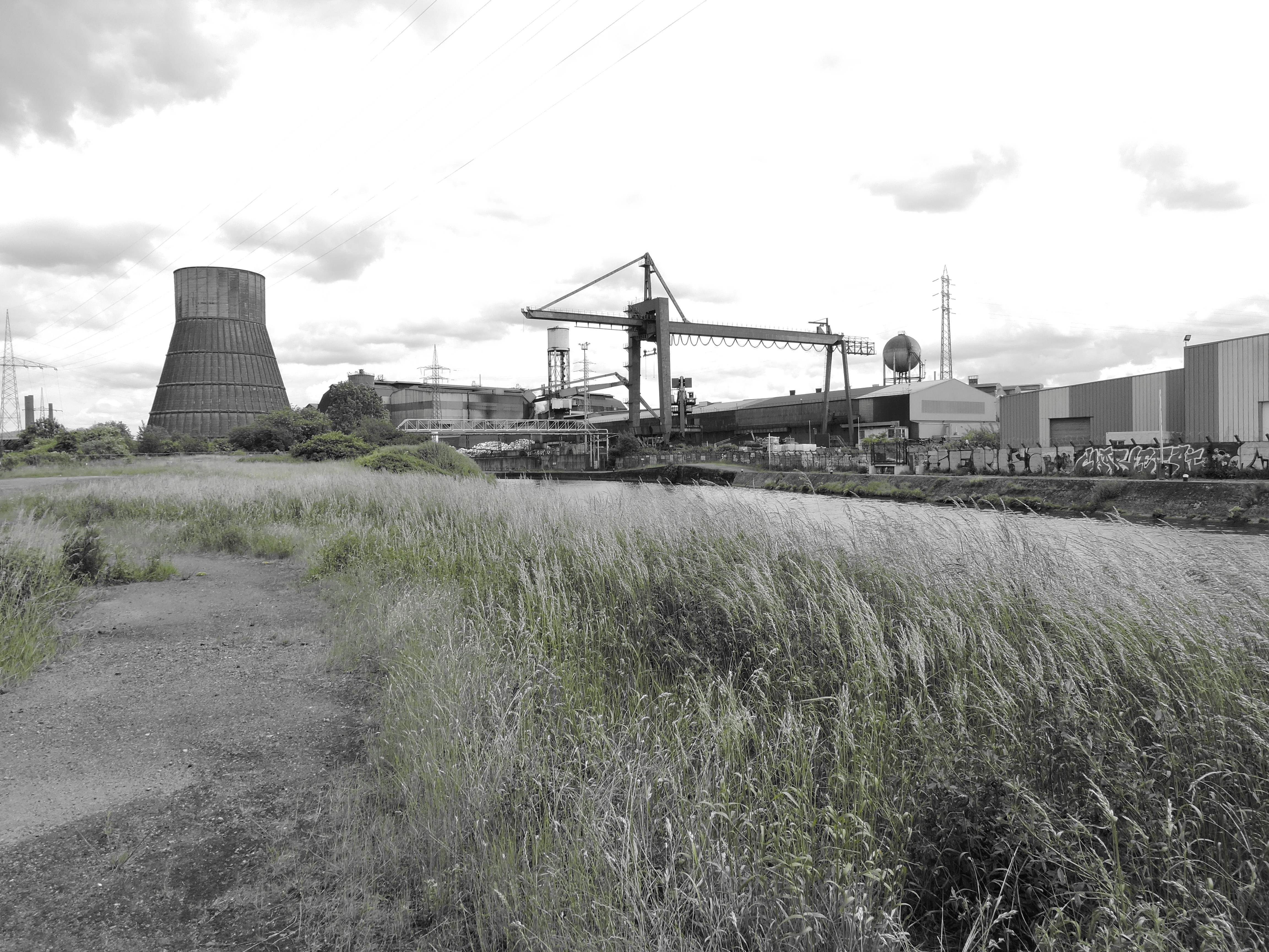 Charleroi, Belgium